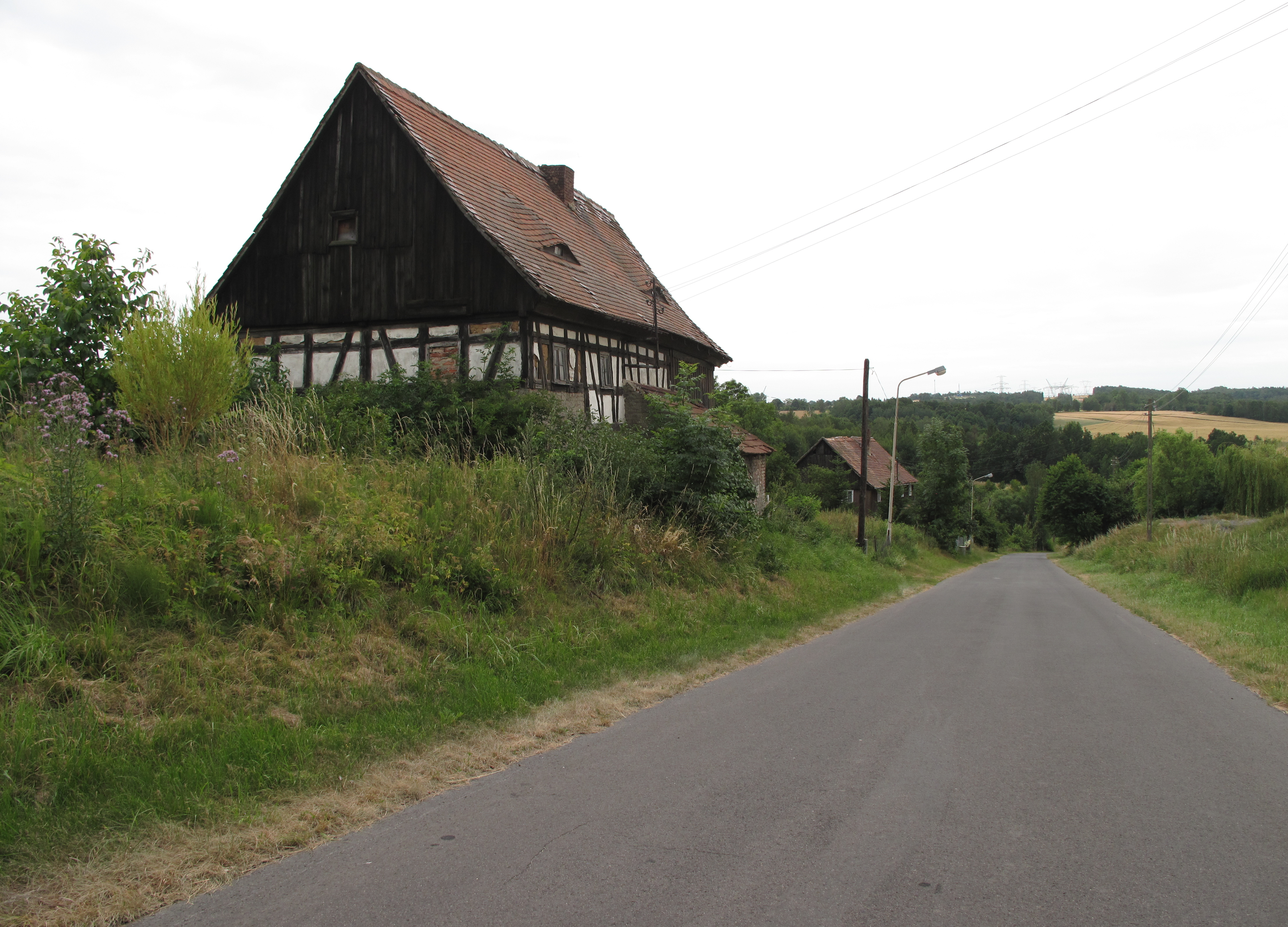 Bratków (województwo dolnośląskie). Polska